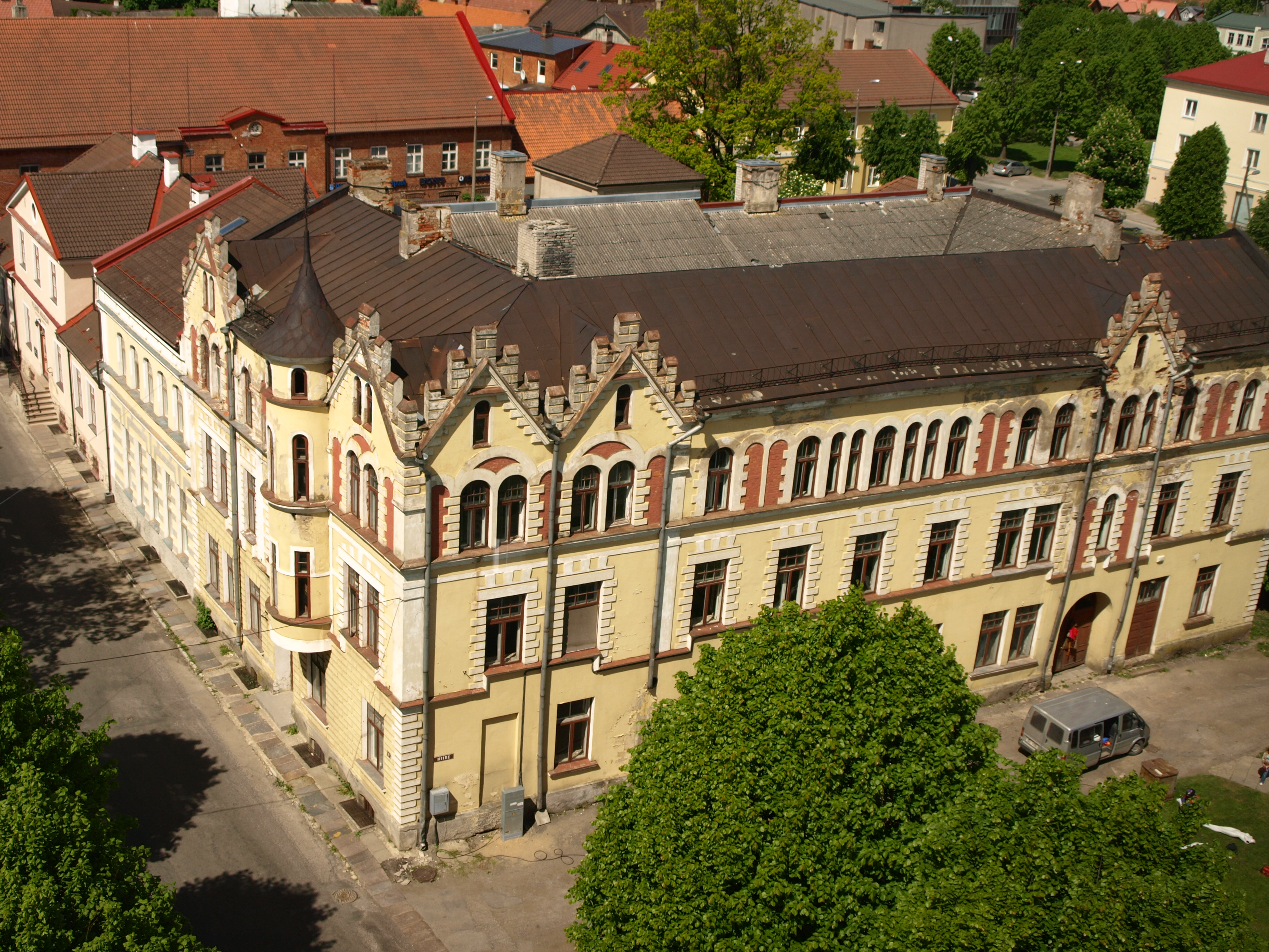 Viljandi vanalinna muinsuskaitseala